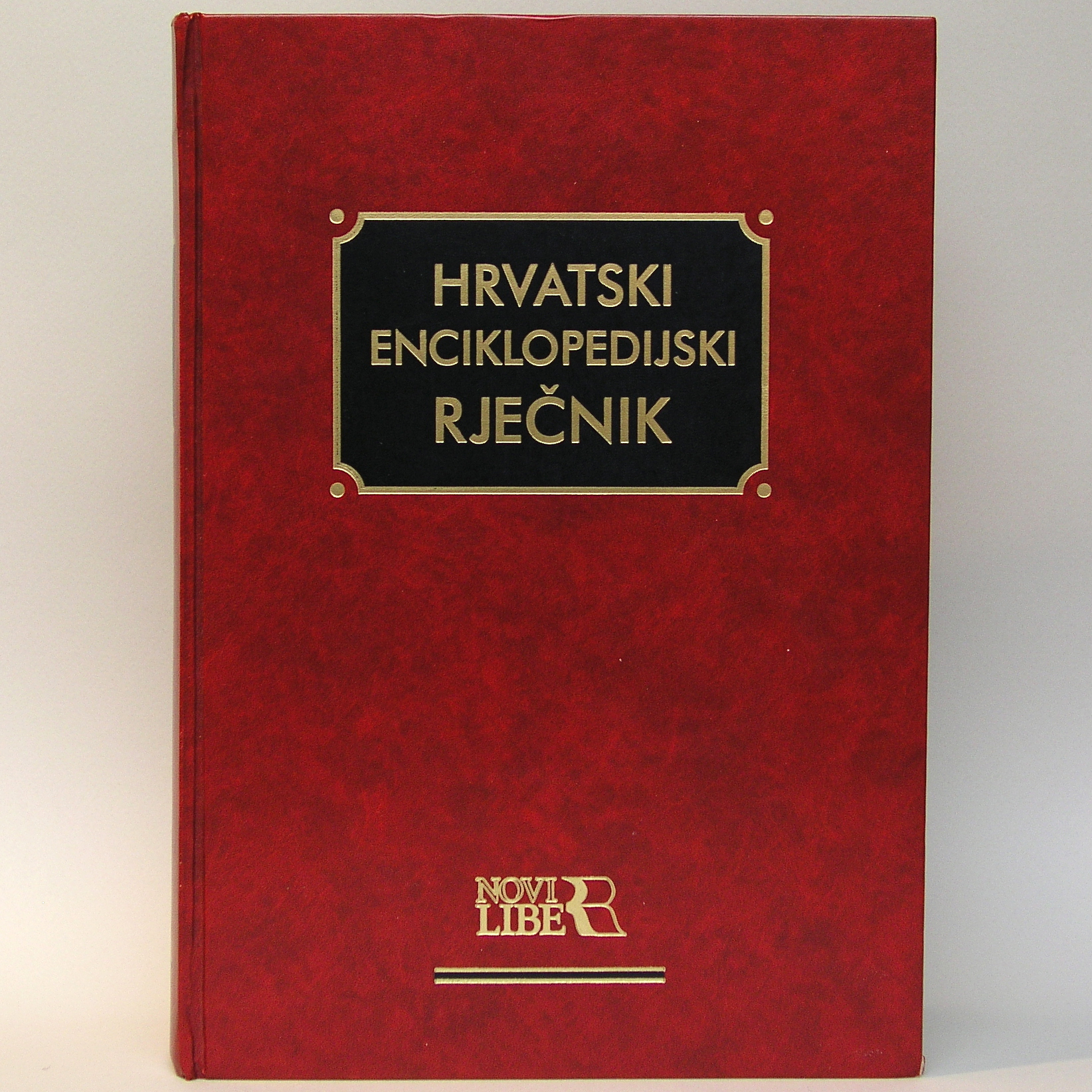 Korice knjige Hrvatski enciklopedijski rječnik, urednici Ranko Matasović, Ljiljana Jojić,Zagreb, Novi Liber, 2002. ISBN 953-6045-21-4